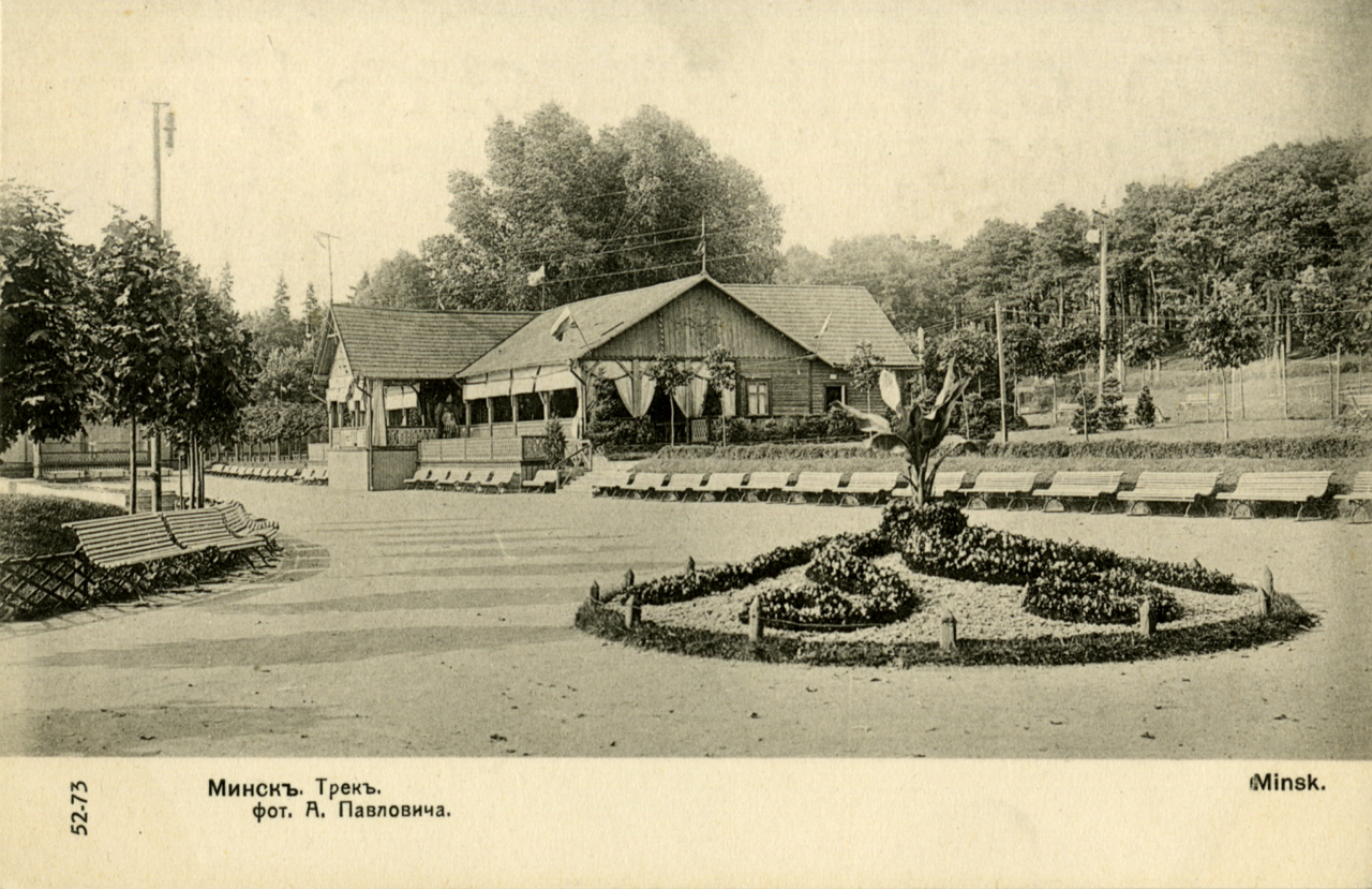 Открытка.